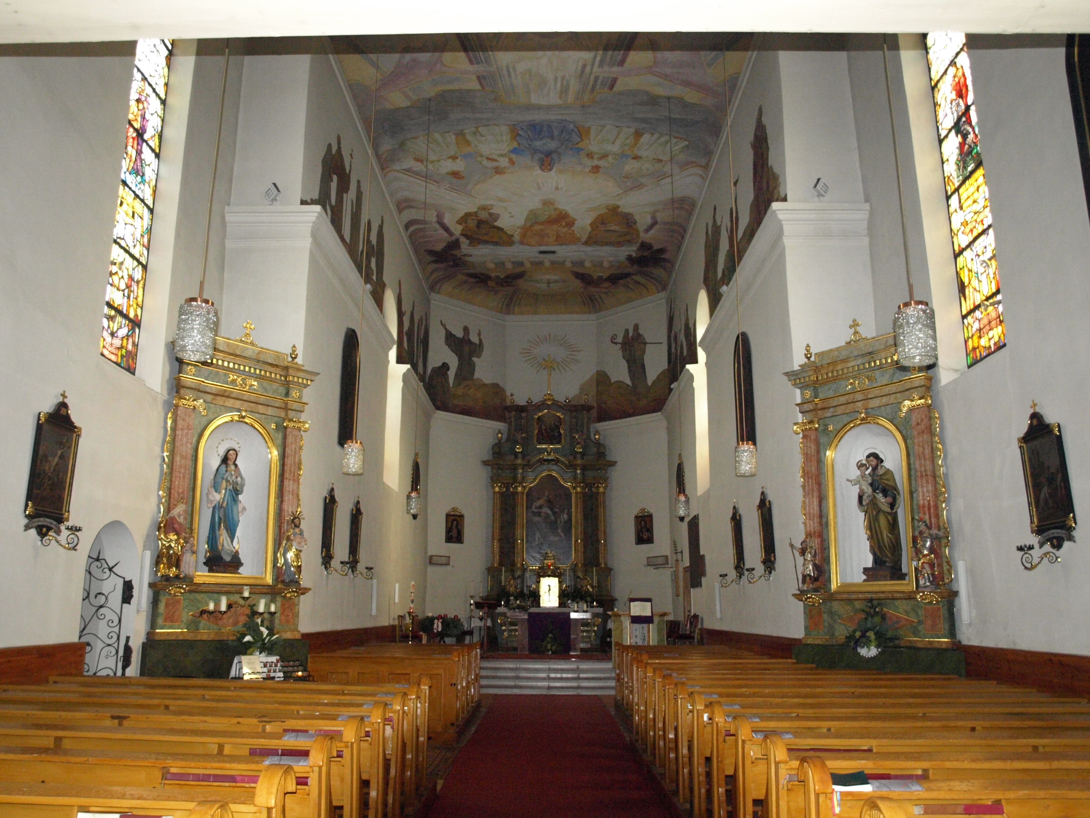 Kath. Pfarrkirche hl. Wolfgang